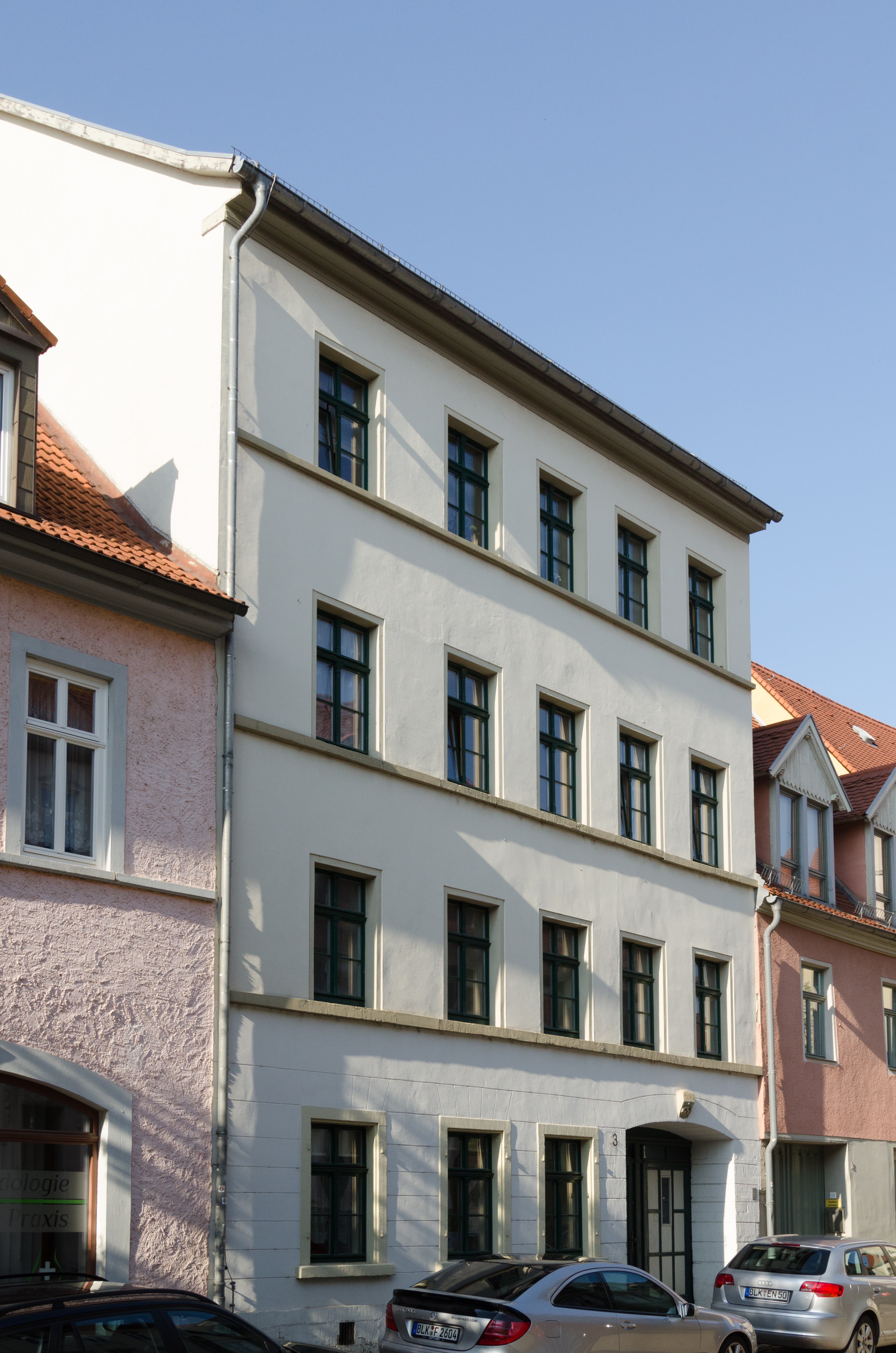 Naumburg, Fischstraße 3